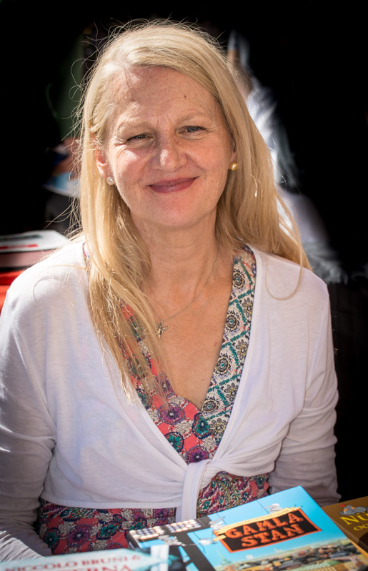 Gudrun Wessnert på Världens längsta bokbord under Stockholms kulturfestival 2015.